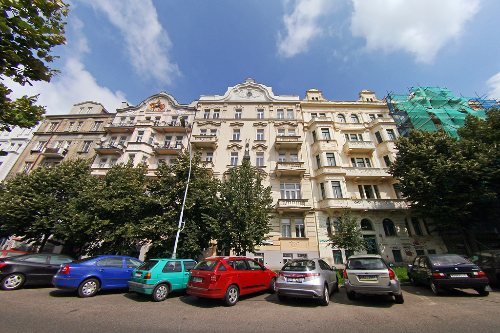 Sídlo Business Institut EDU a.s., Praha-Vršovice, Kodaňská 558/25